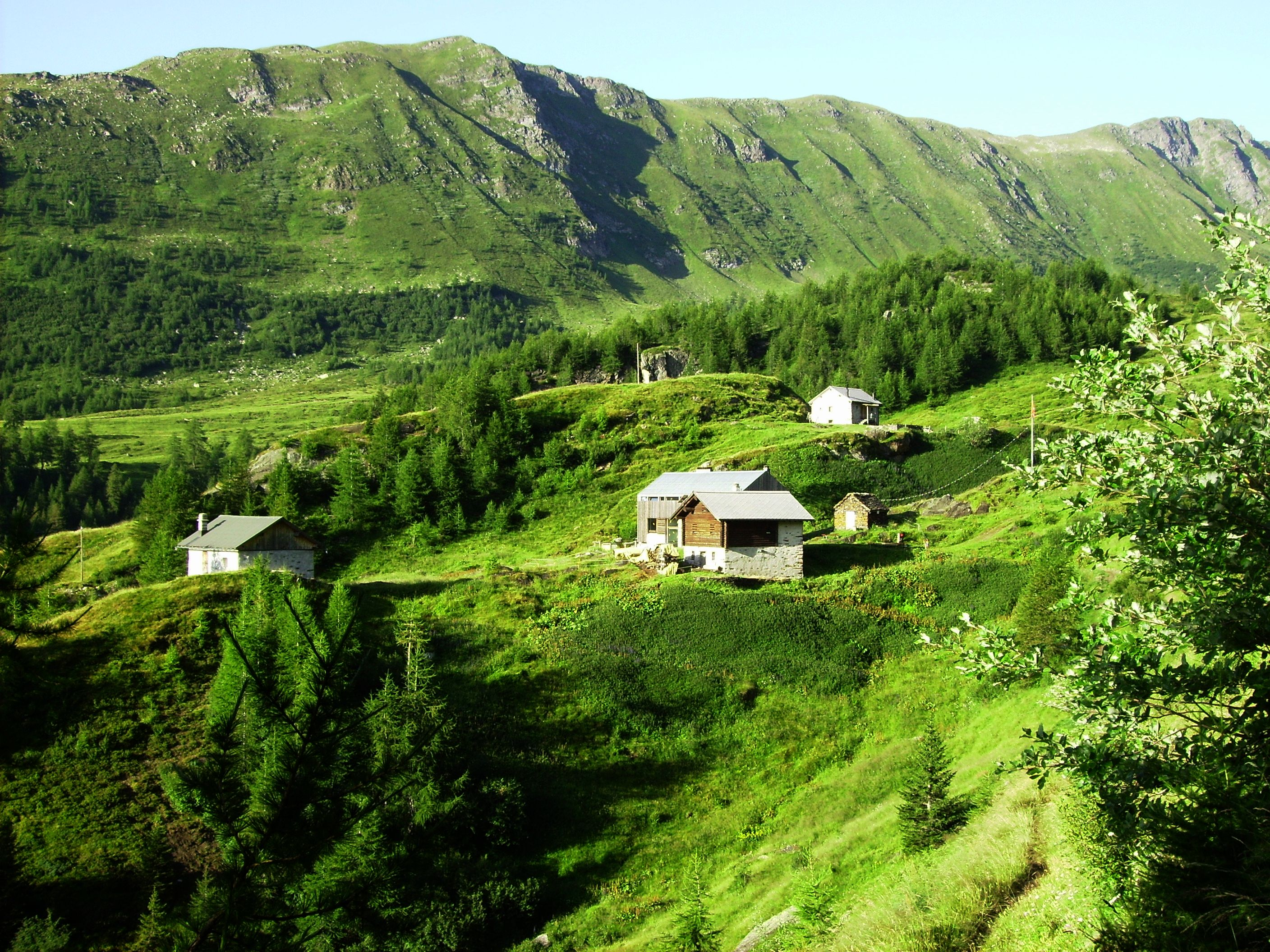 Die Capanna Bovarina des UTOE in Blenio, Tessin